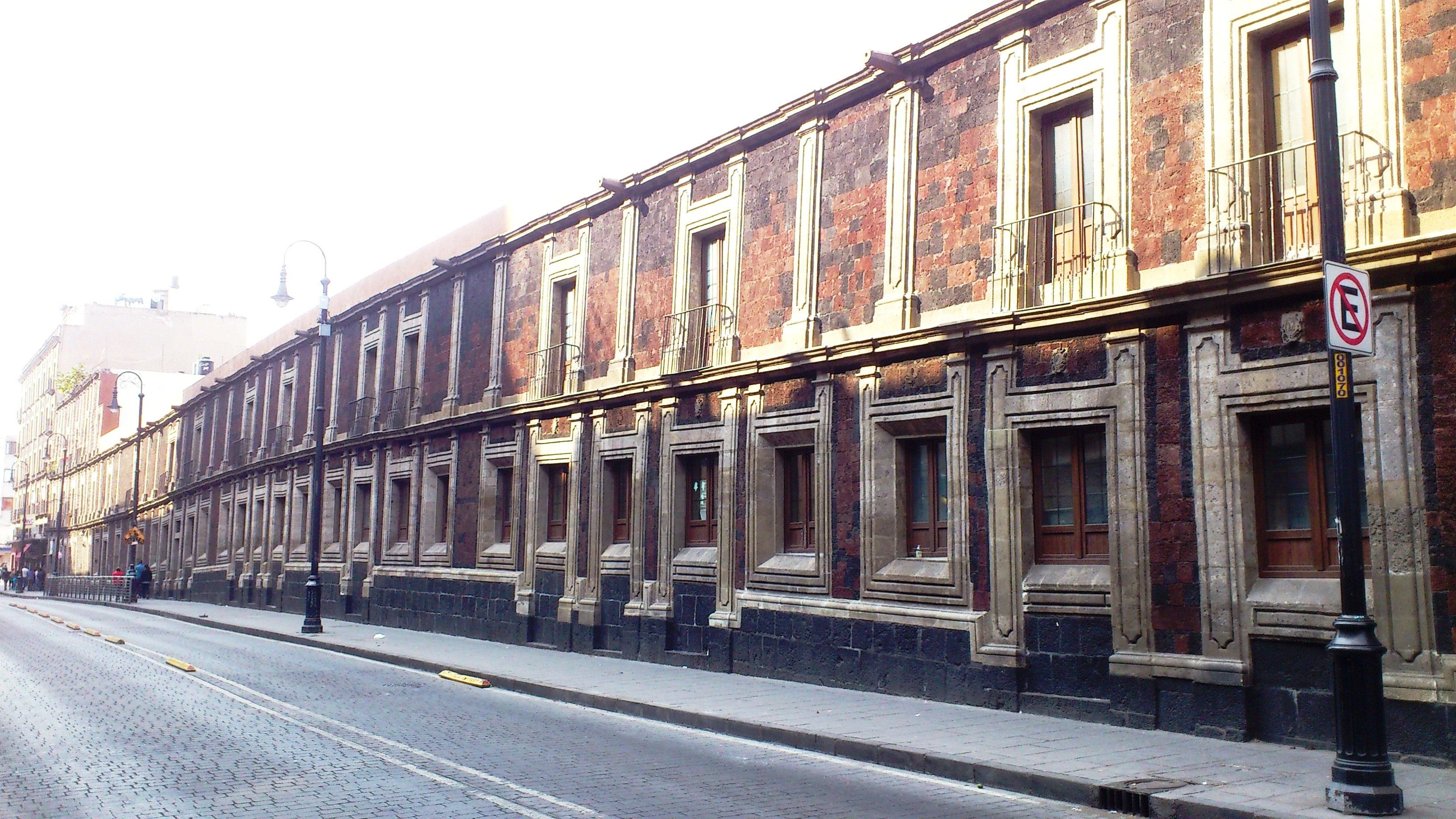 Fachada de la casa de las calderas en el centro histórico de la Ciudad de México